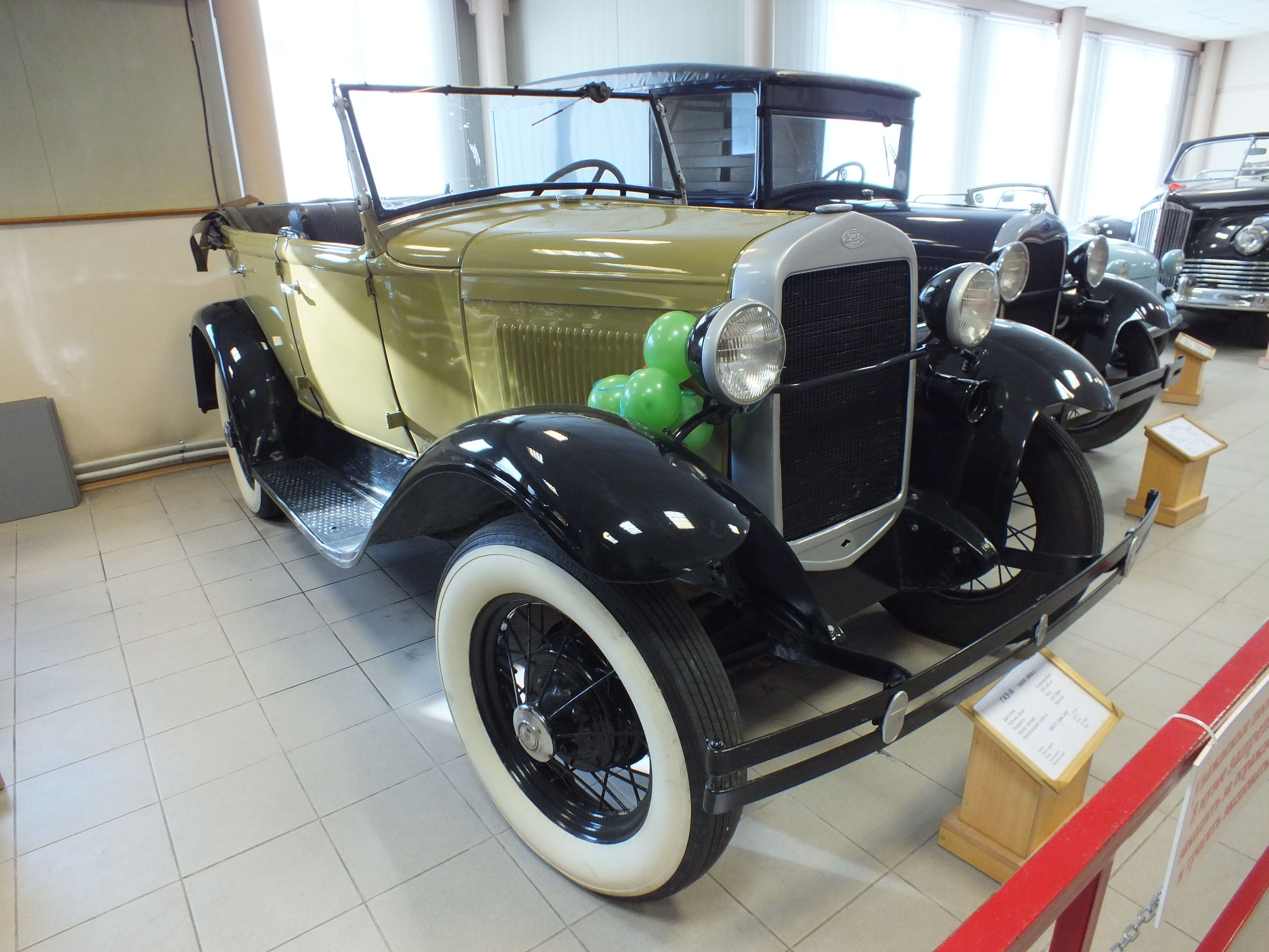 ГАЗ-А во Владивостоке